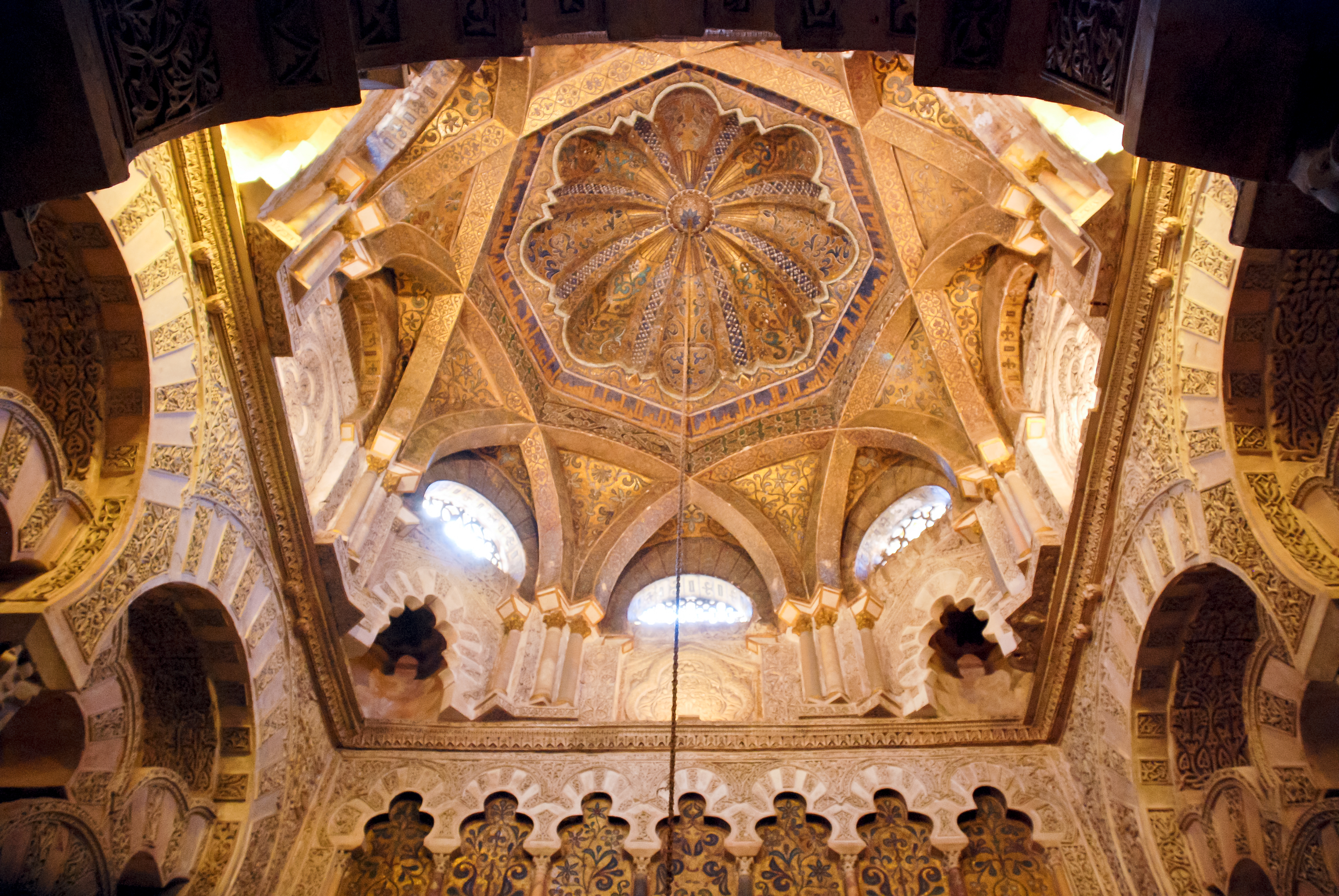 Cúpula de la Maqsura de la Mezquita de Córdoba (España).